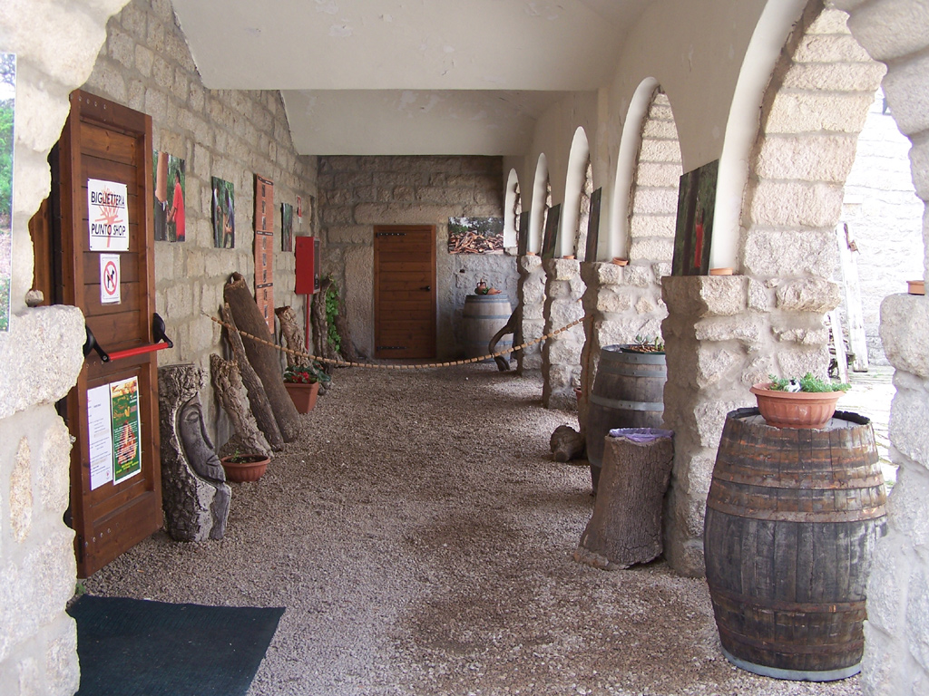 Parte dell'ingresso al Museo del Sughero di Calangianus.